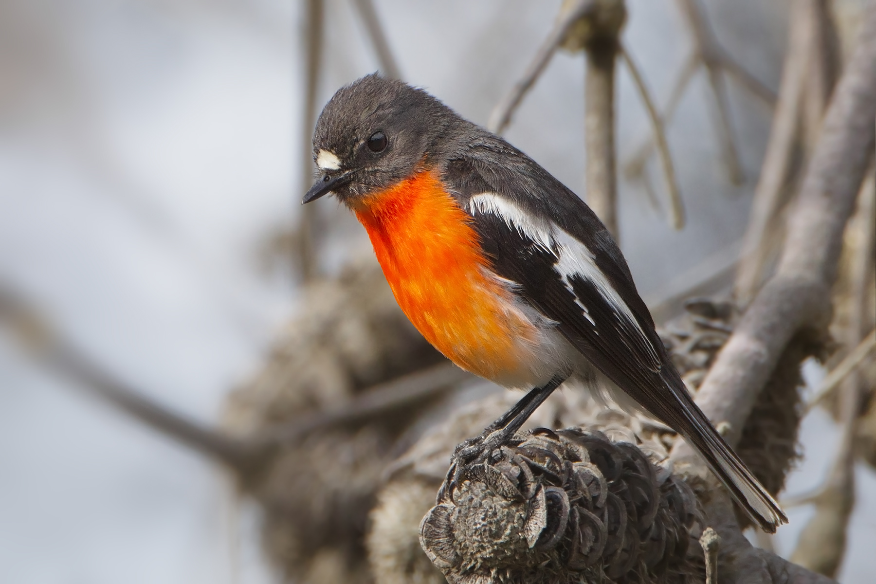 Flame Robin (Petroica phoenicea) near Goat's Beach, Tasmania, Australia